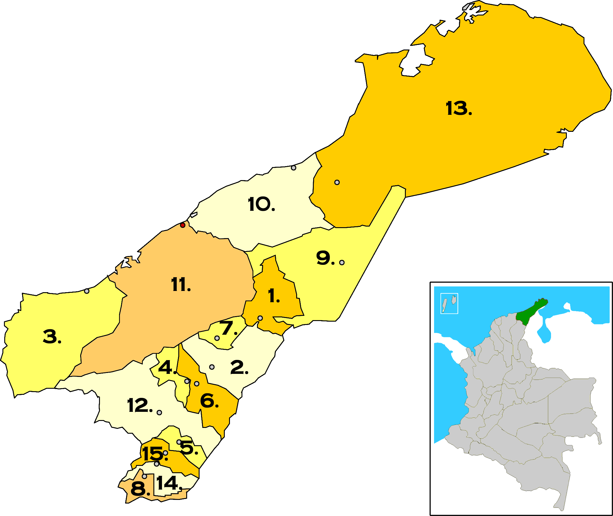 Map of La Guajira municipalities, Colombia. 1. Albania 2. Barrancas 3. Dibulla 4. Distracción 5. El Molino 6. Fonseca 7. Hatonuevo 8. La Jagua del Pilar 9. Maicao 10. Manaure 11. Riohacha 12. San Juan del Cesar 13. Uribia 14. Urumita 15. Villanueva